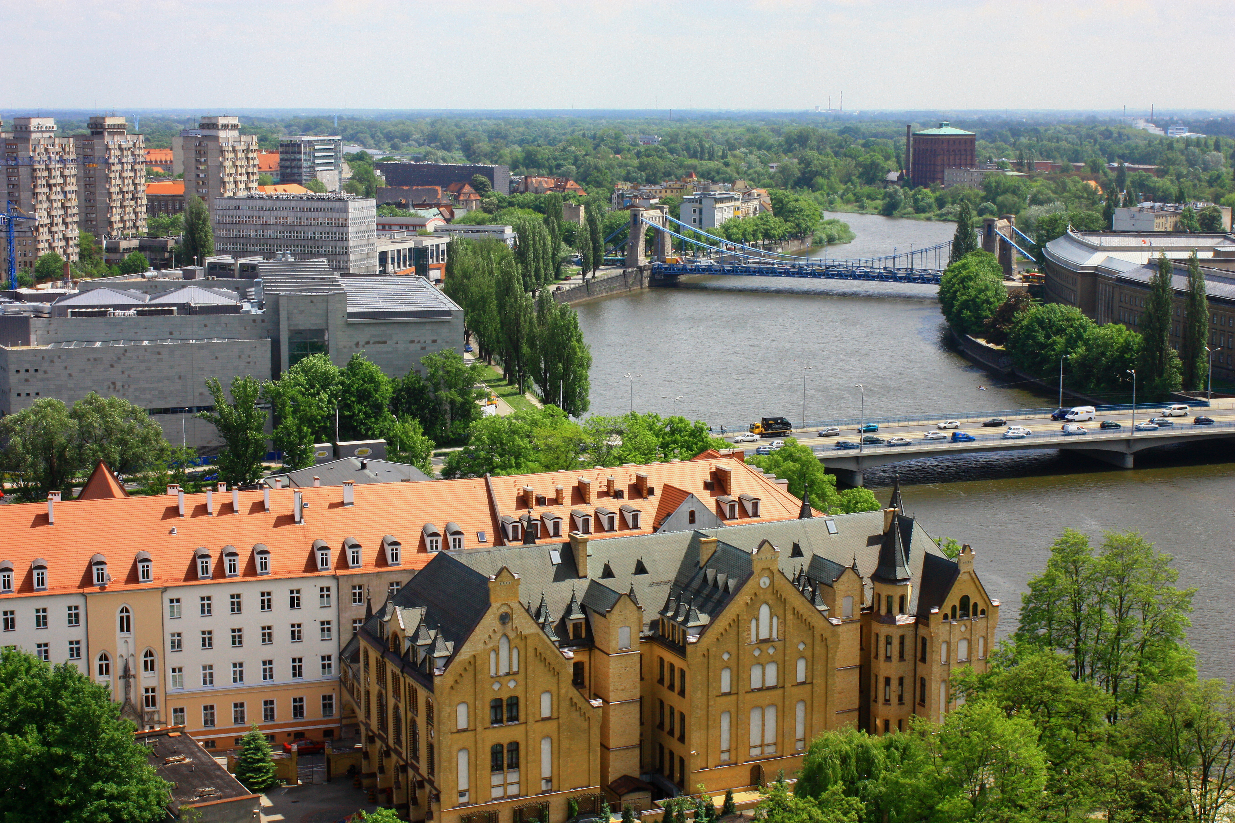 Wrocław, zespół urbanistyczny Ostrowia Tumskiego i wysp: Piaskowej, Bielarskiej, Słodowej